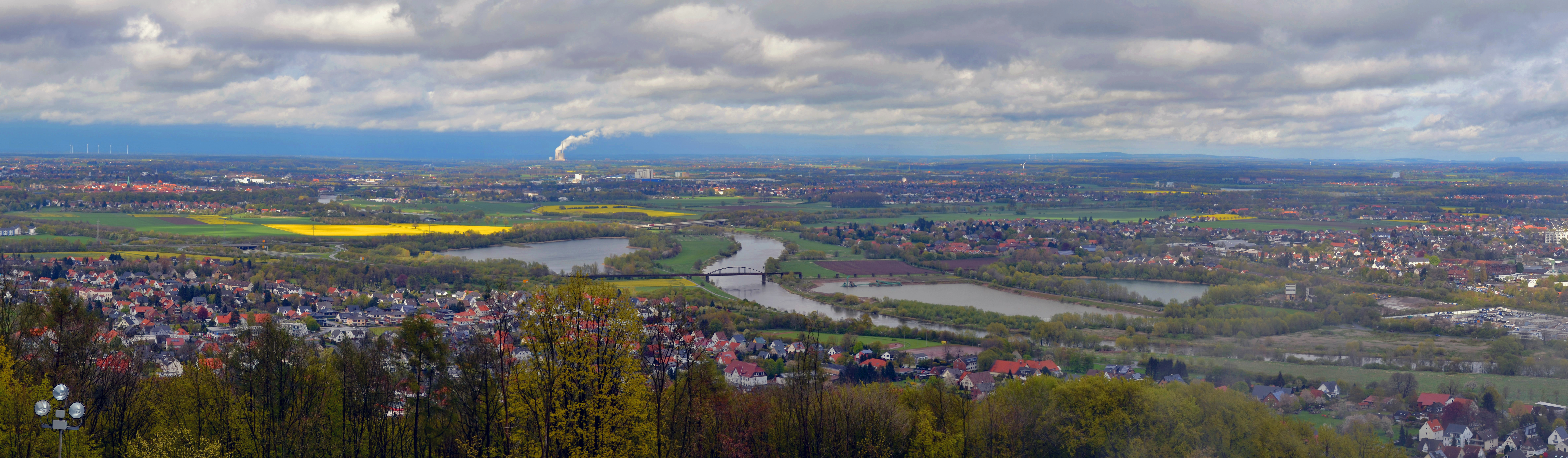 Blick nach Norden, vorne Barkhausen (Porta Westfalica), Mitte die alte Eisenbahnbrücke über die Weser, links oben Minden, im Hintergrund das Kraftwerk Heyden